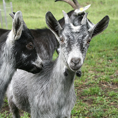 Capra Grigia Projekt von ProSpecieRara